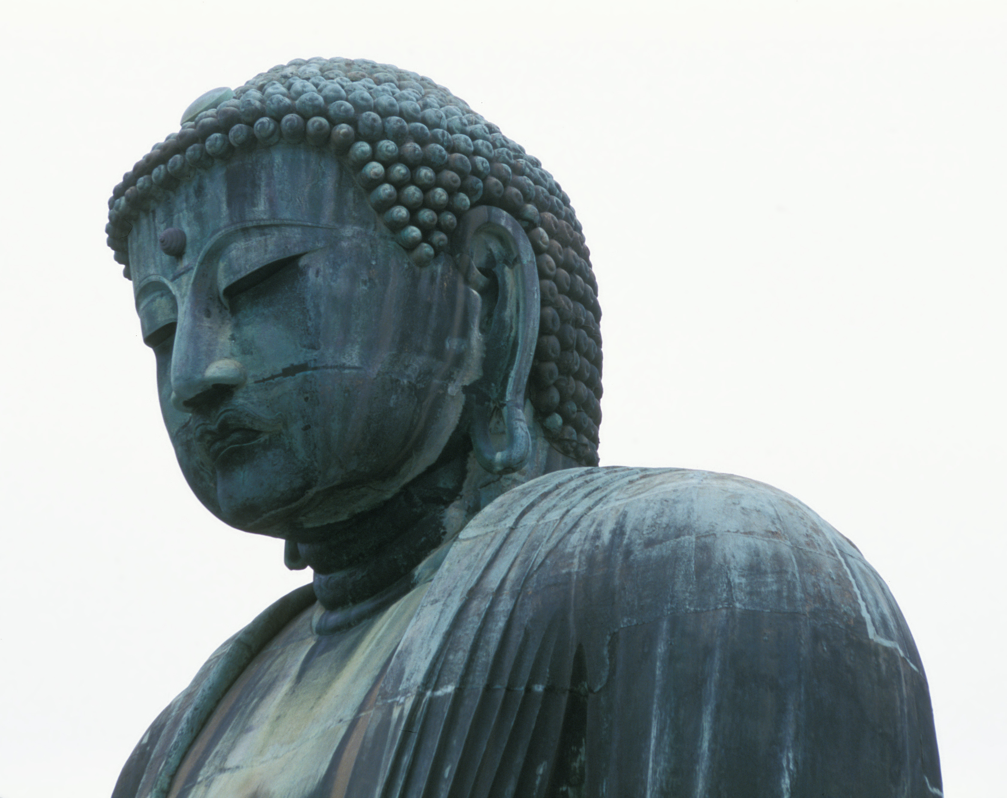 Buddha statue, Kamakura, Japan